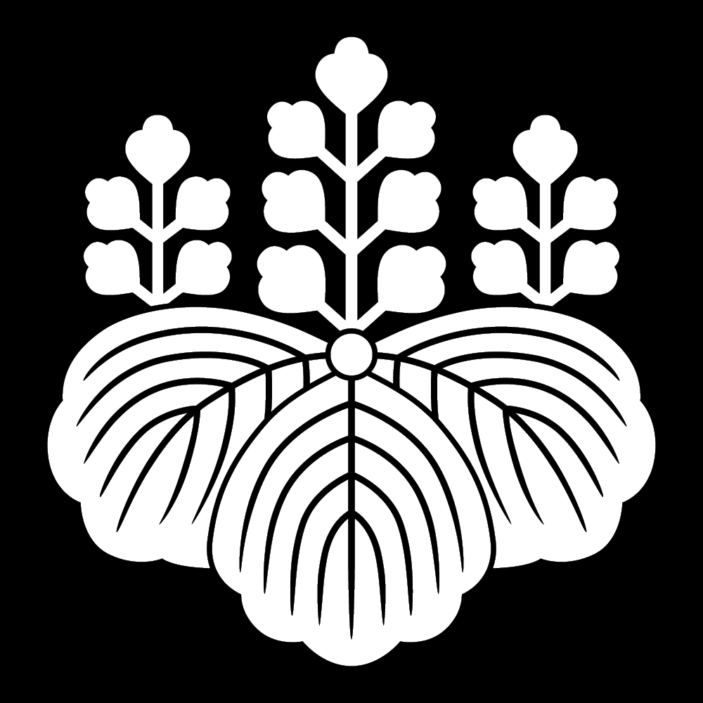 家紋「桐」の一種。五七の桐紋。